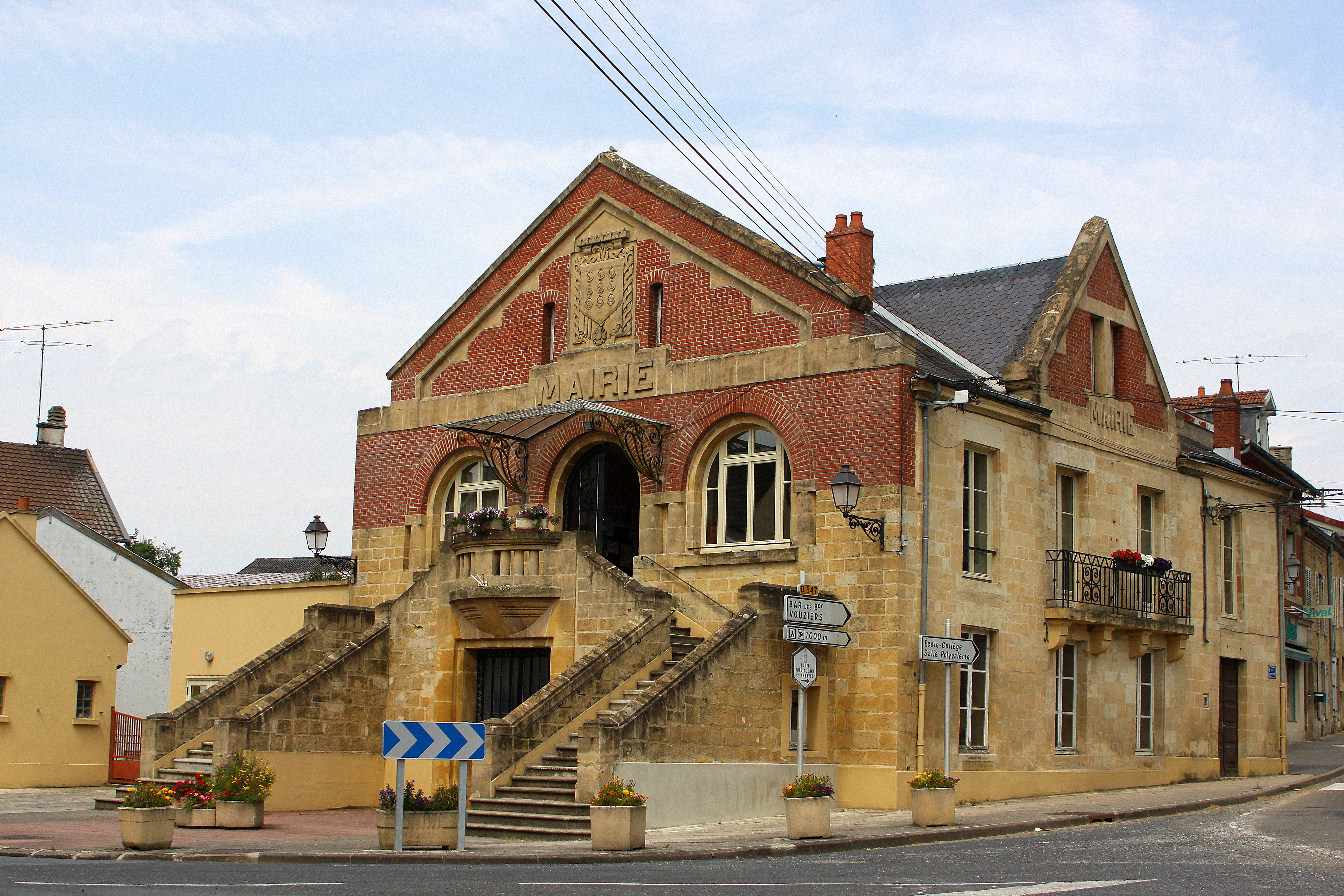 Marie de Buzancy